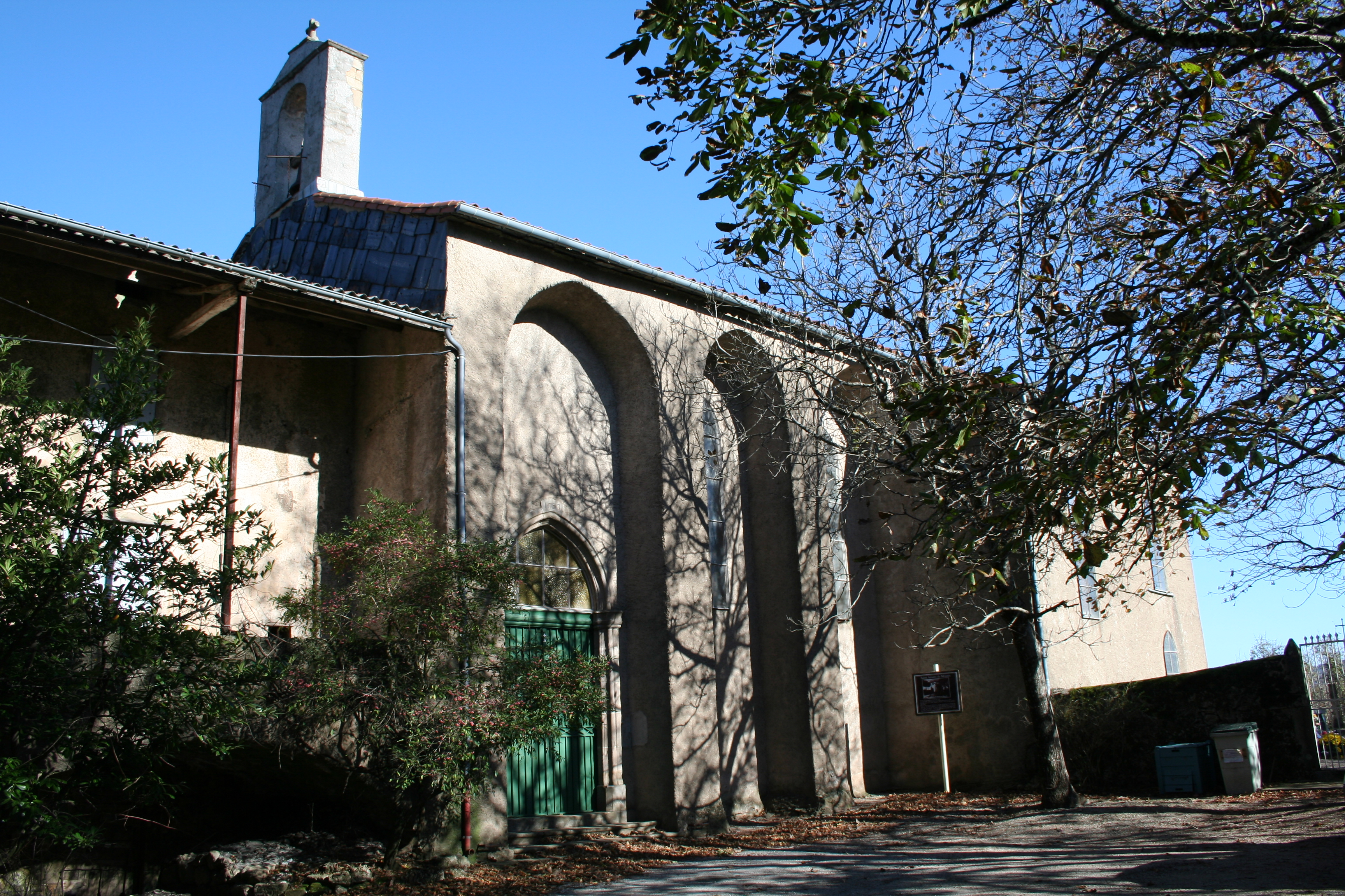 Castanet-le-Haut (Hérault) - église Saint-Amans-de-Mounis.